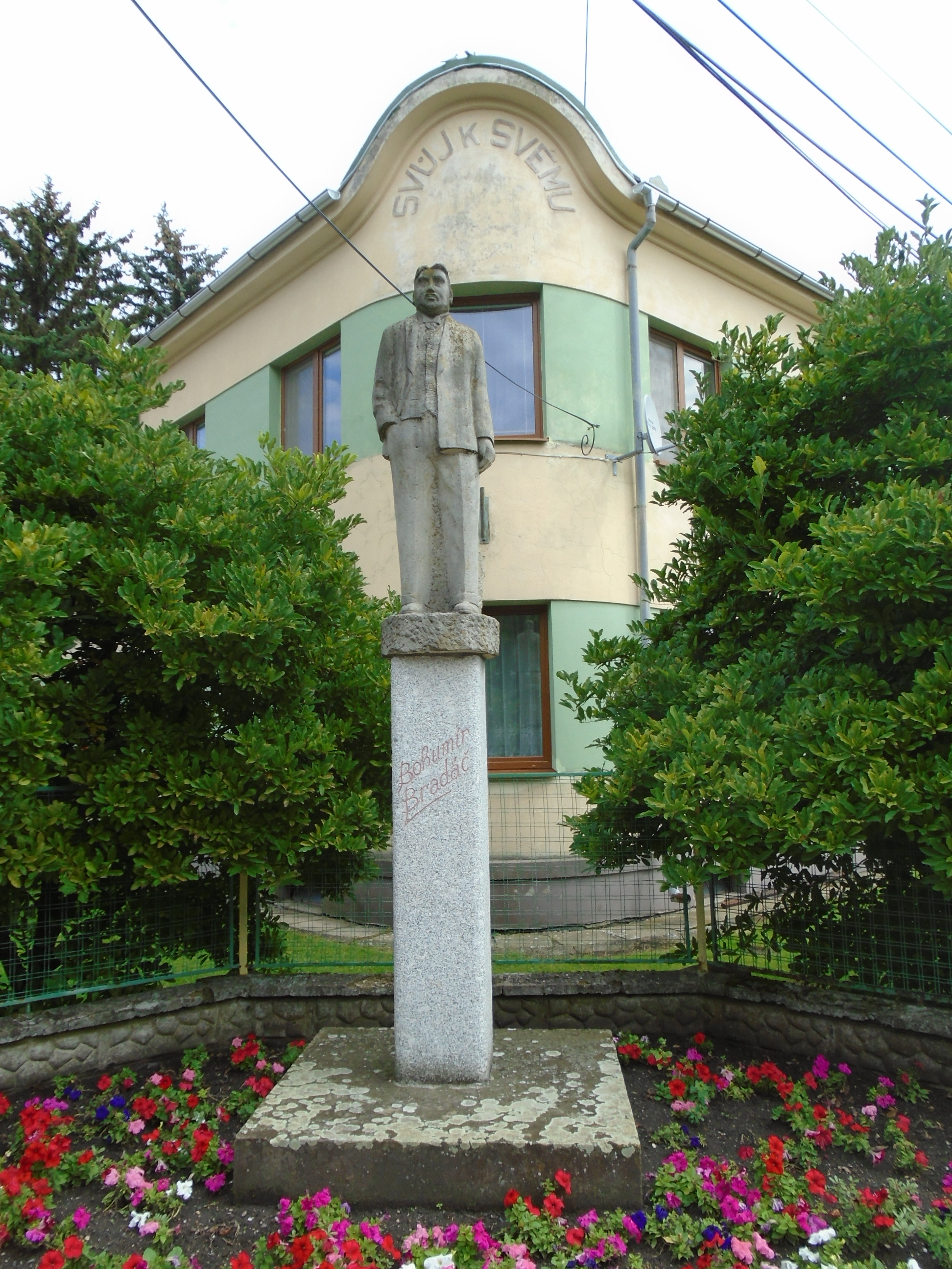 Socha připomínající politika Bohumíra Bradáče (1881-1935).